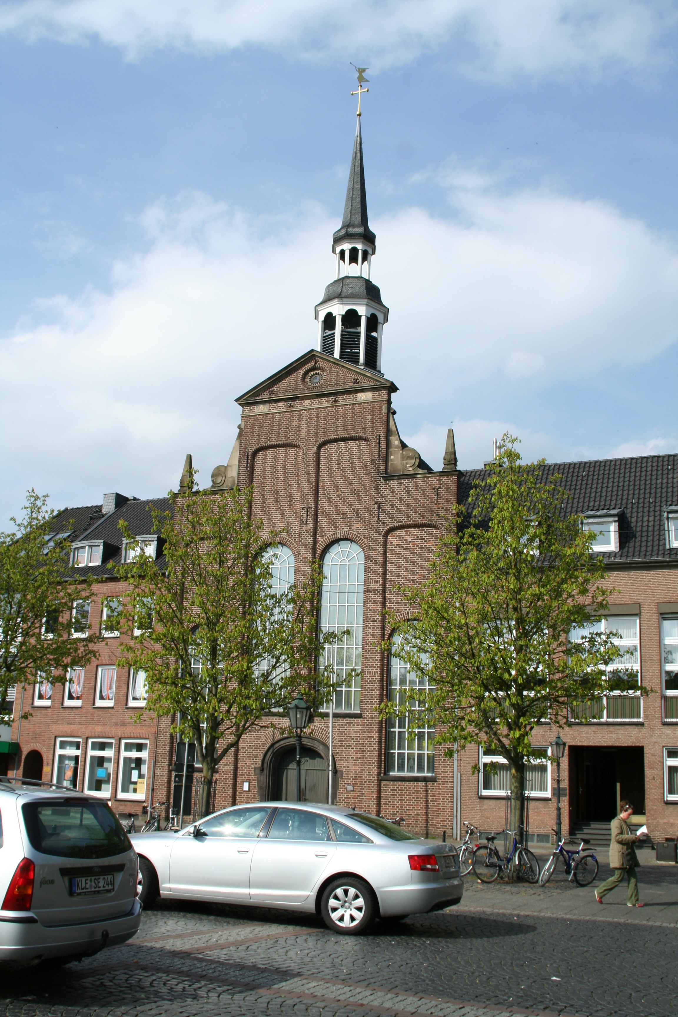 ev.Kirche am Markt, Goch, NRW, Germany